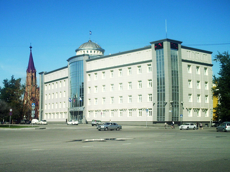 Здание управления "ИркутскЭнерго" и Римский католический костёл